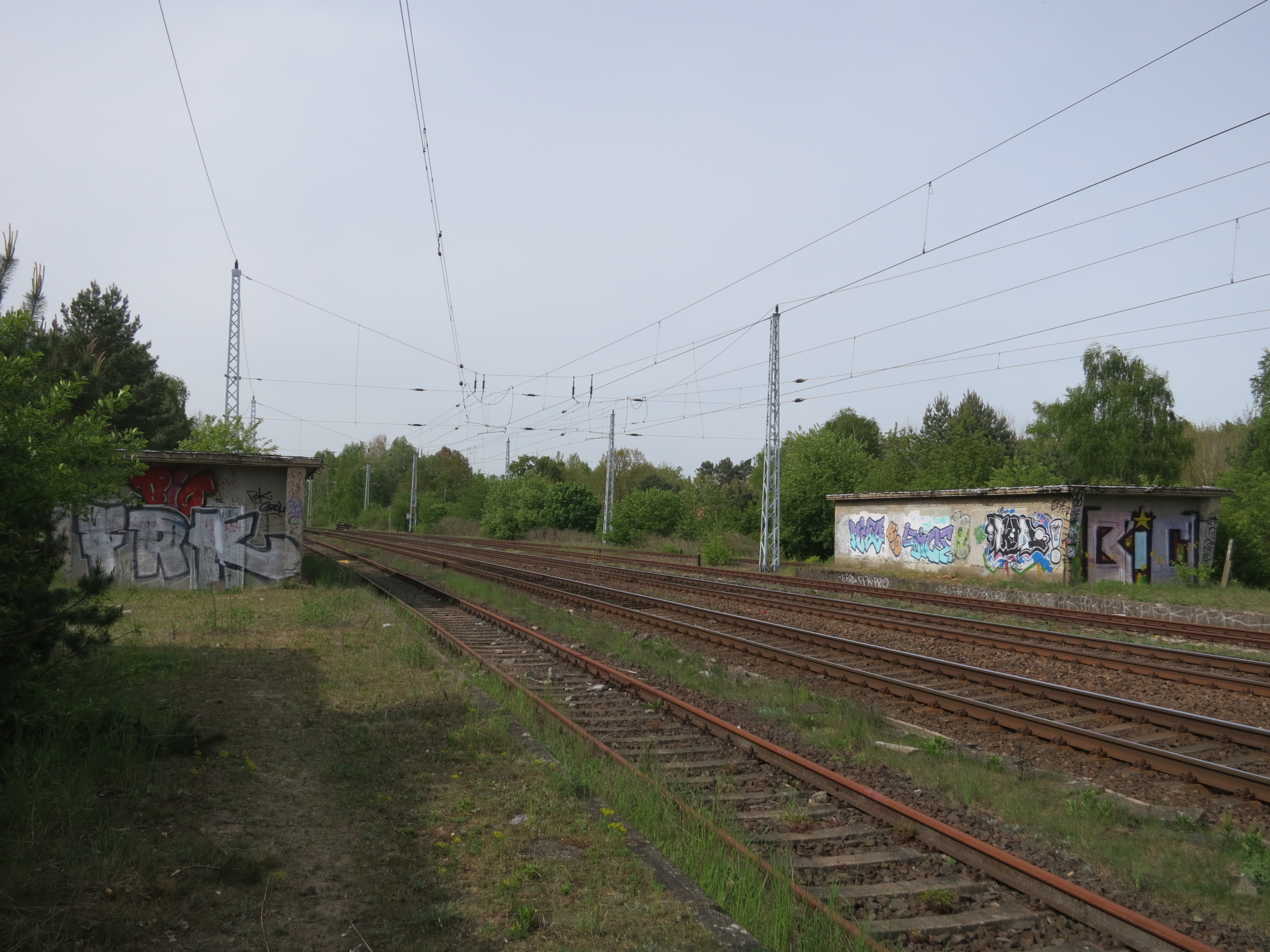 Früherer Bahnhof Fichtengrund, Bahnsteige und Treppenzugänge in den Tunnel